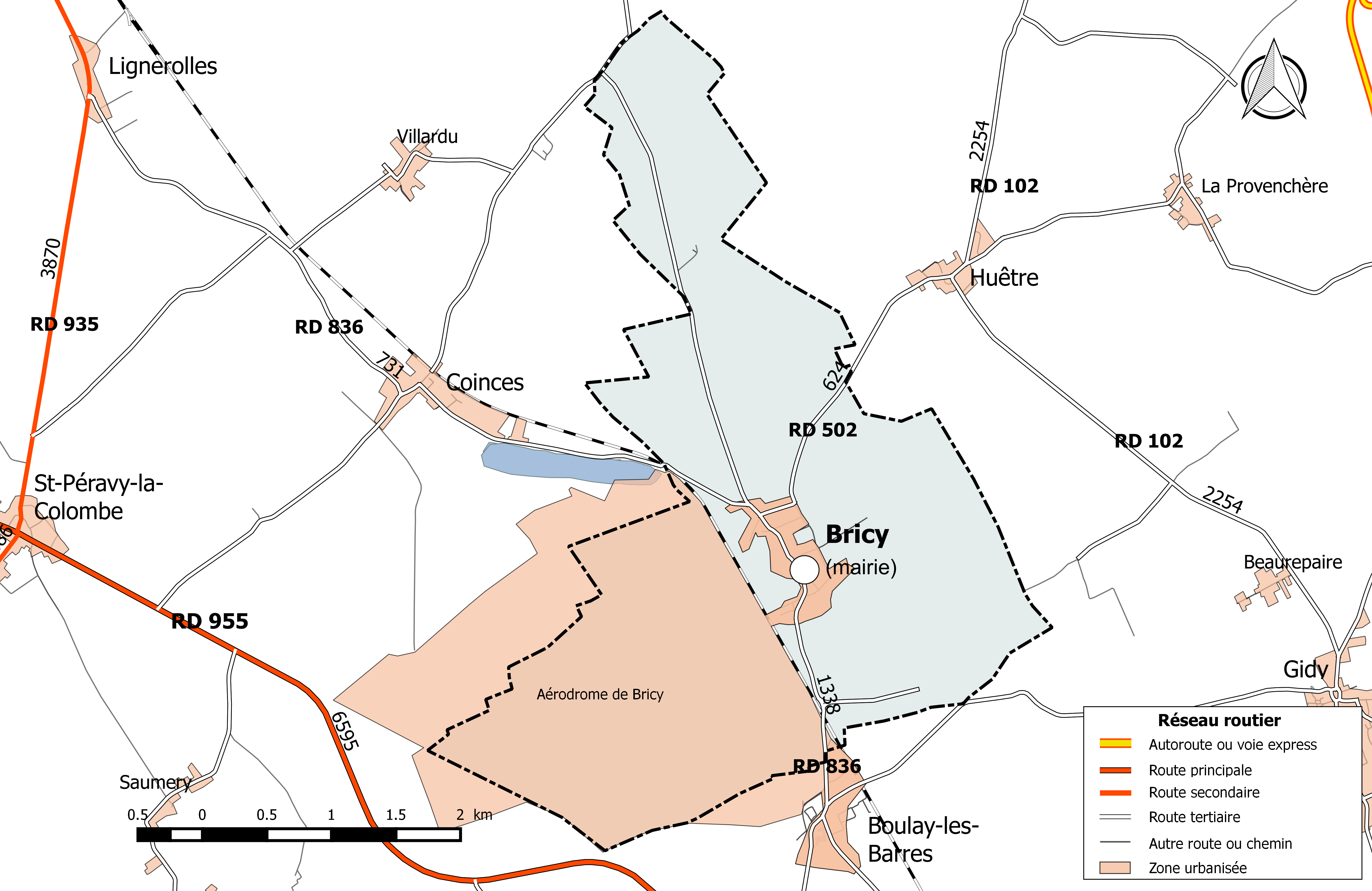 Carte du réseau routier de la commune de Bricy.